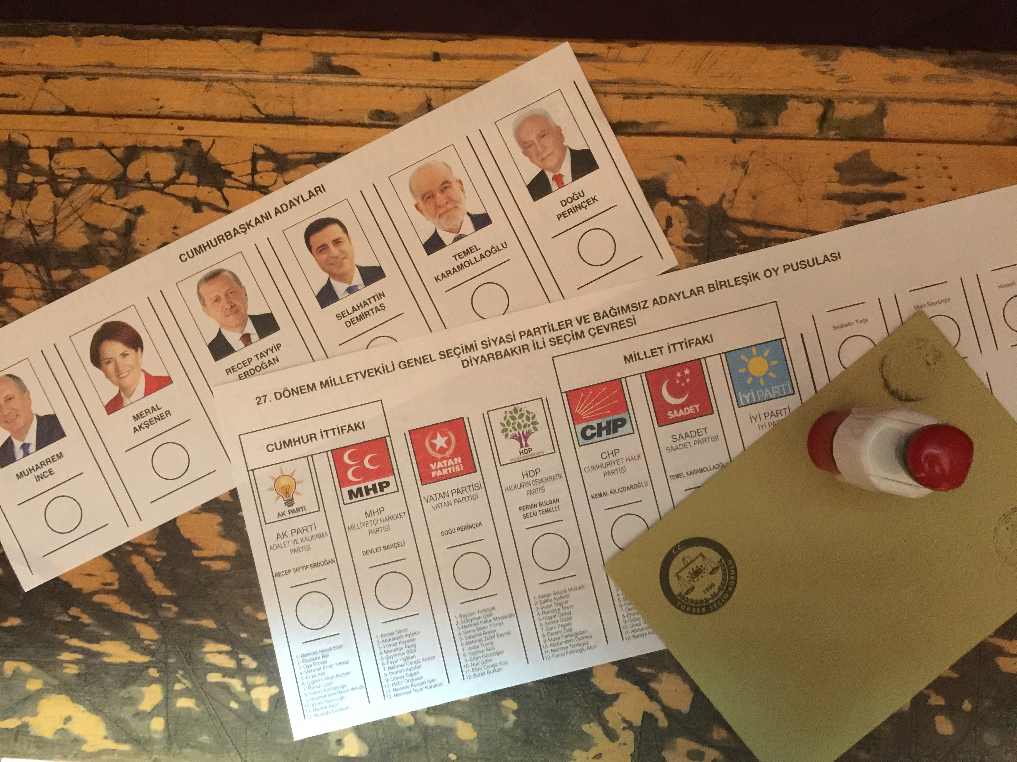 2018 Türkiye seçimlerinde oy pusulası ve damgayla zarf